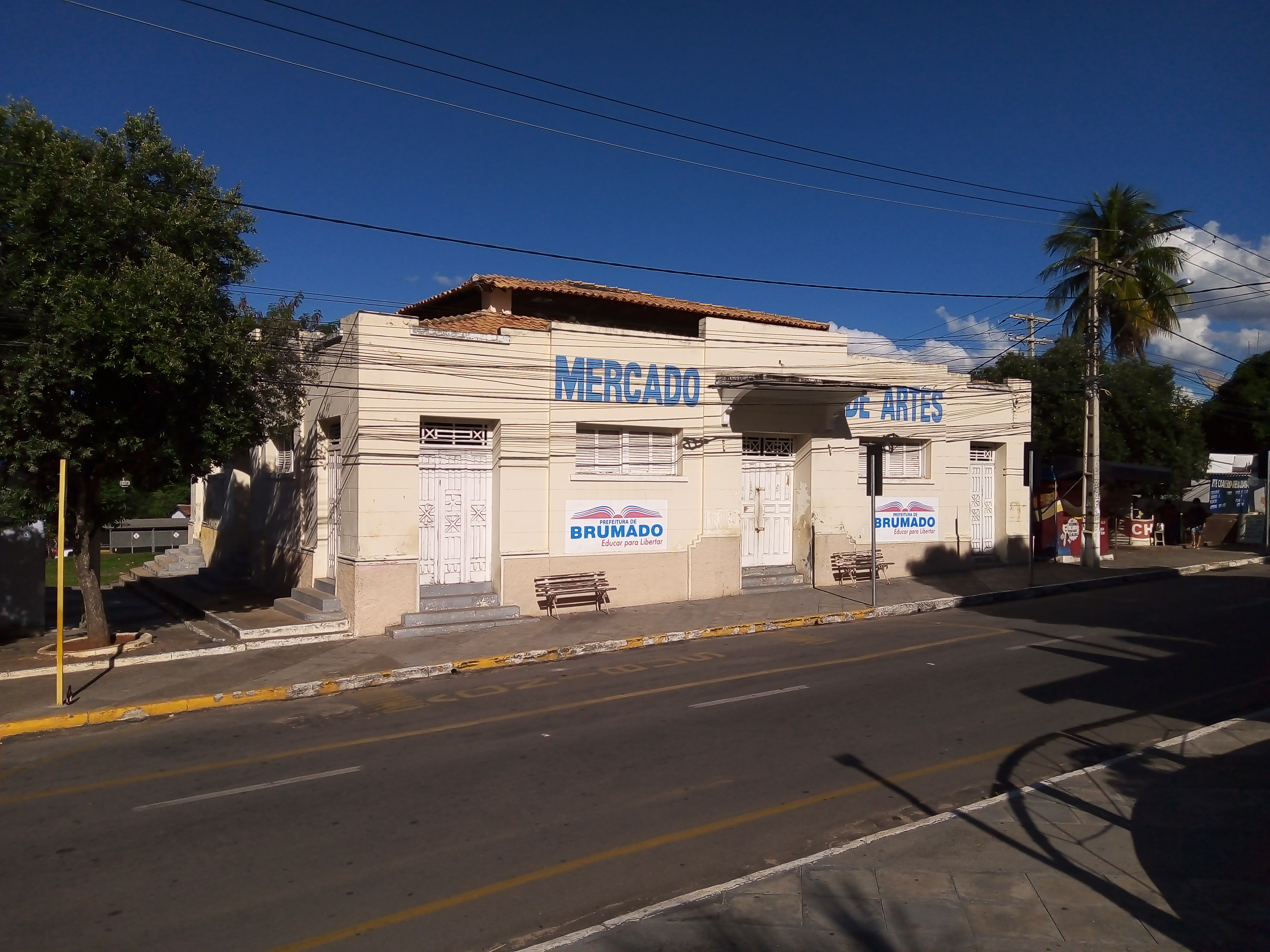 Como acima